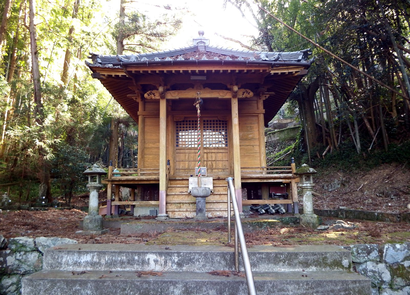 高野山仏眼院の本堂